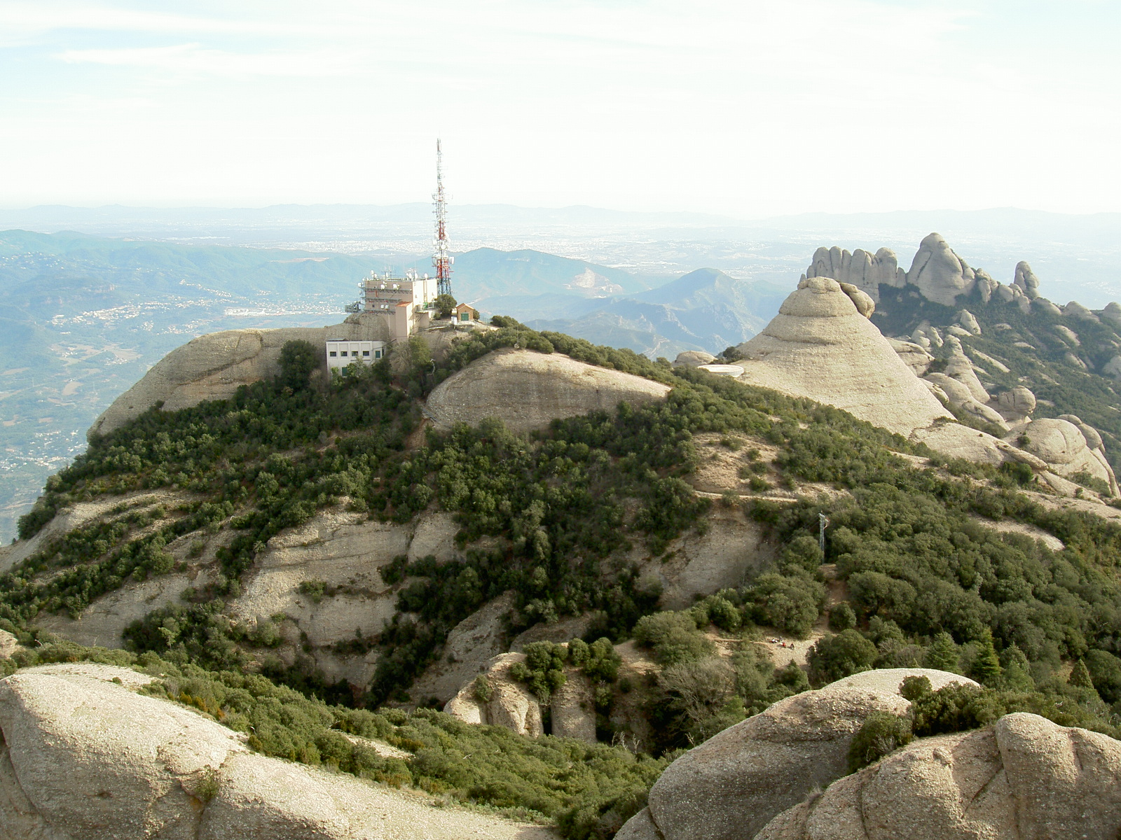 Vista des de Sant Jeroni, Muntanya de Montserrat.